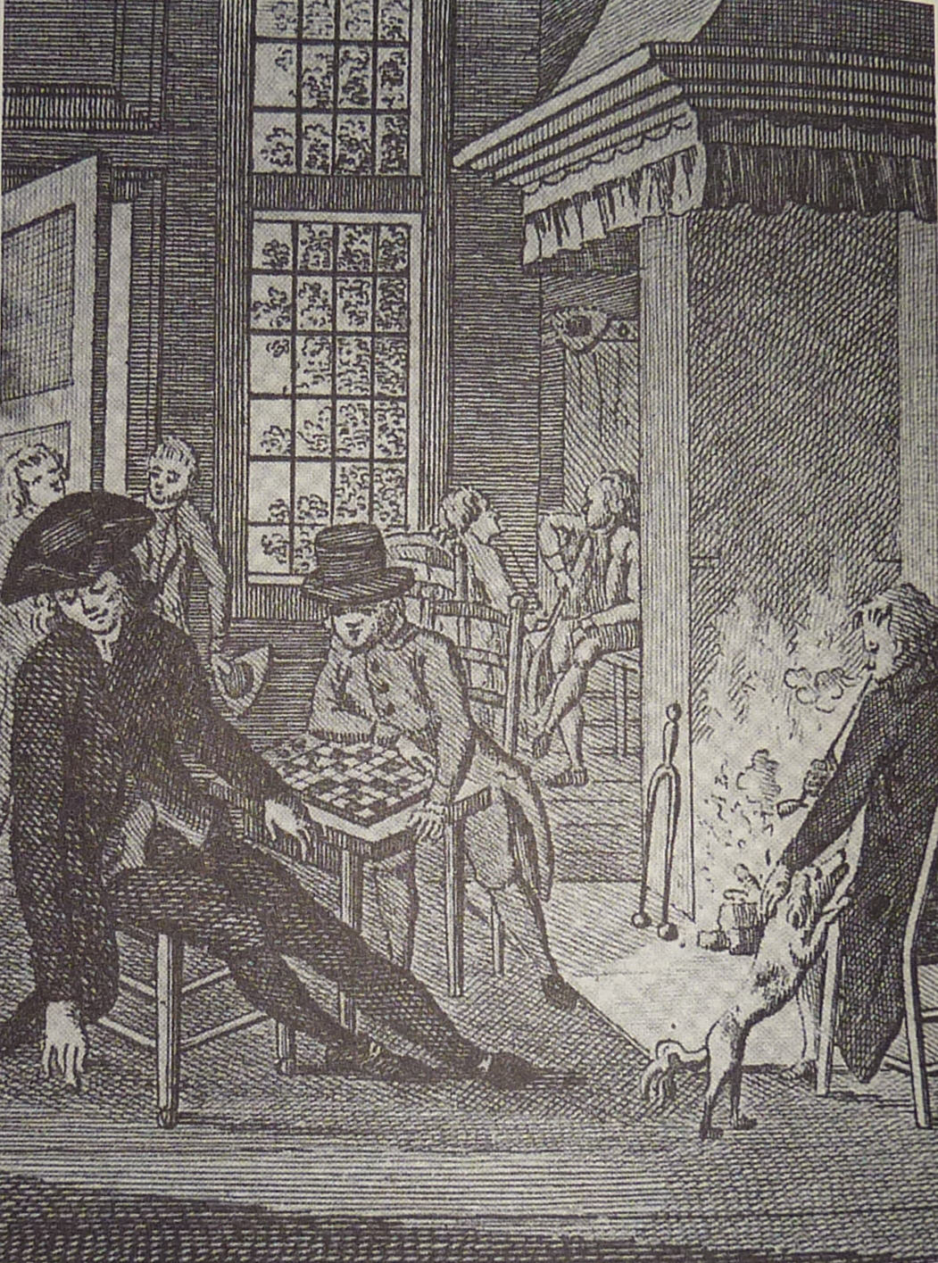 Daniel Cajanus im Blauw Jan, zeitgenössische Zeichnung, später im Almanak tot Not van't Algemen von 1802 veröffentlicht